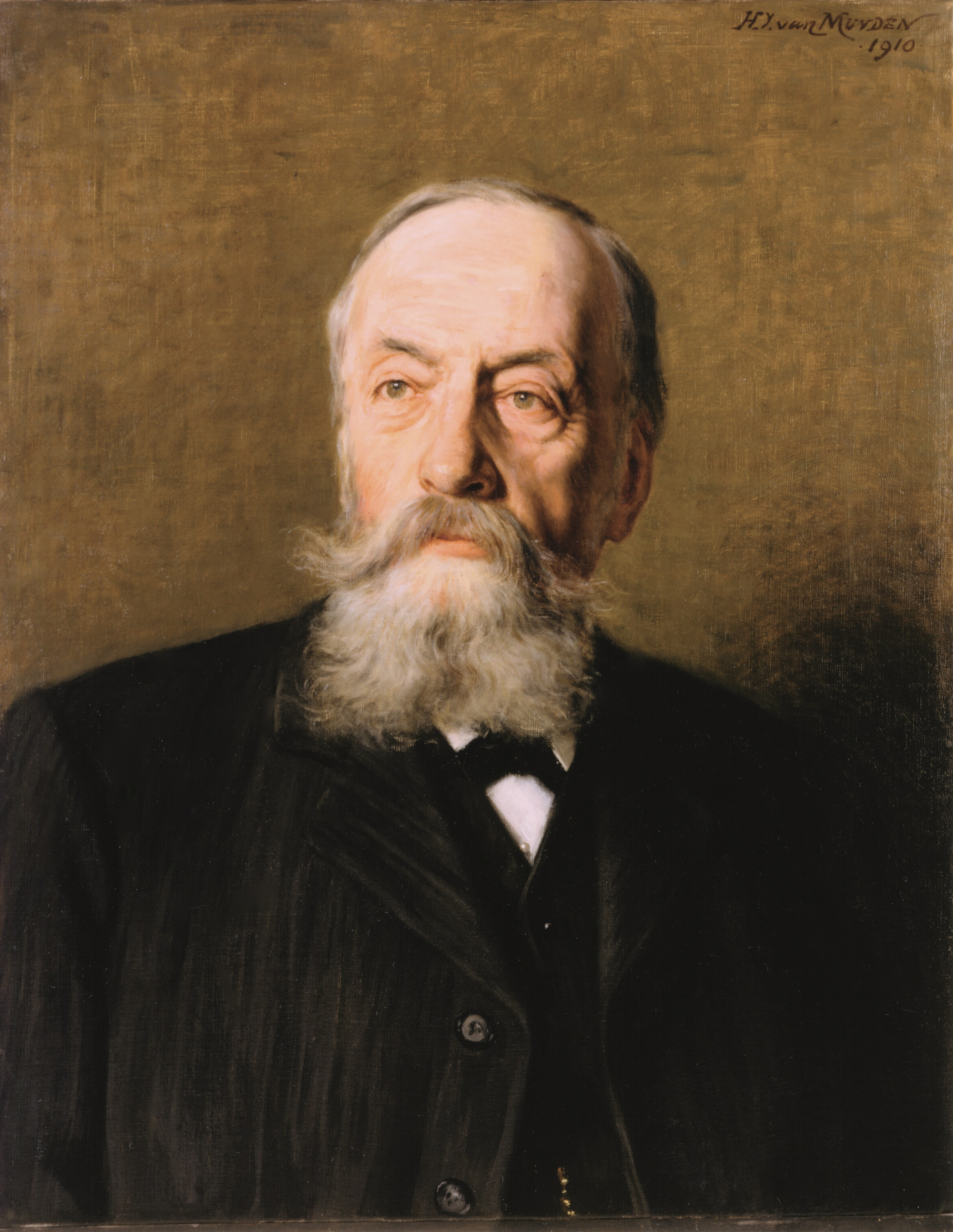 Ami Bordier, fondateur de la Banque Bordier & Cie